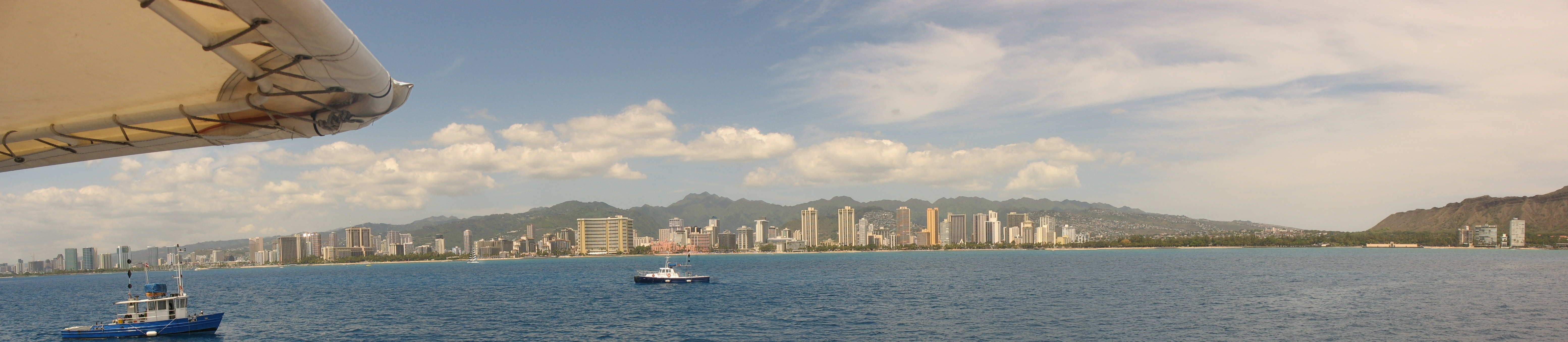 Waikiki from boat